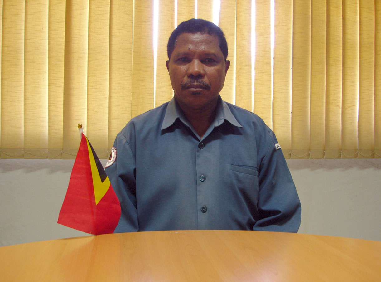 Augusto de Araujo, Administrator des Subdistrikts Bazartete